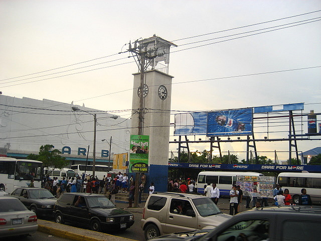 Mona Road in Mona, Jamaica 2008.